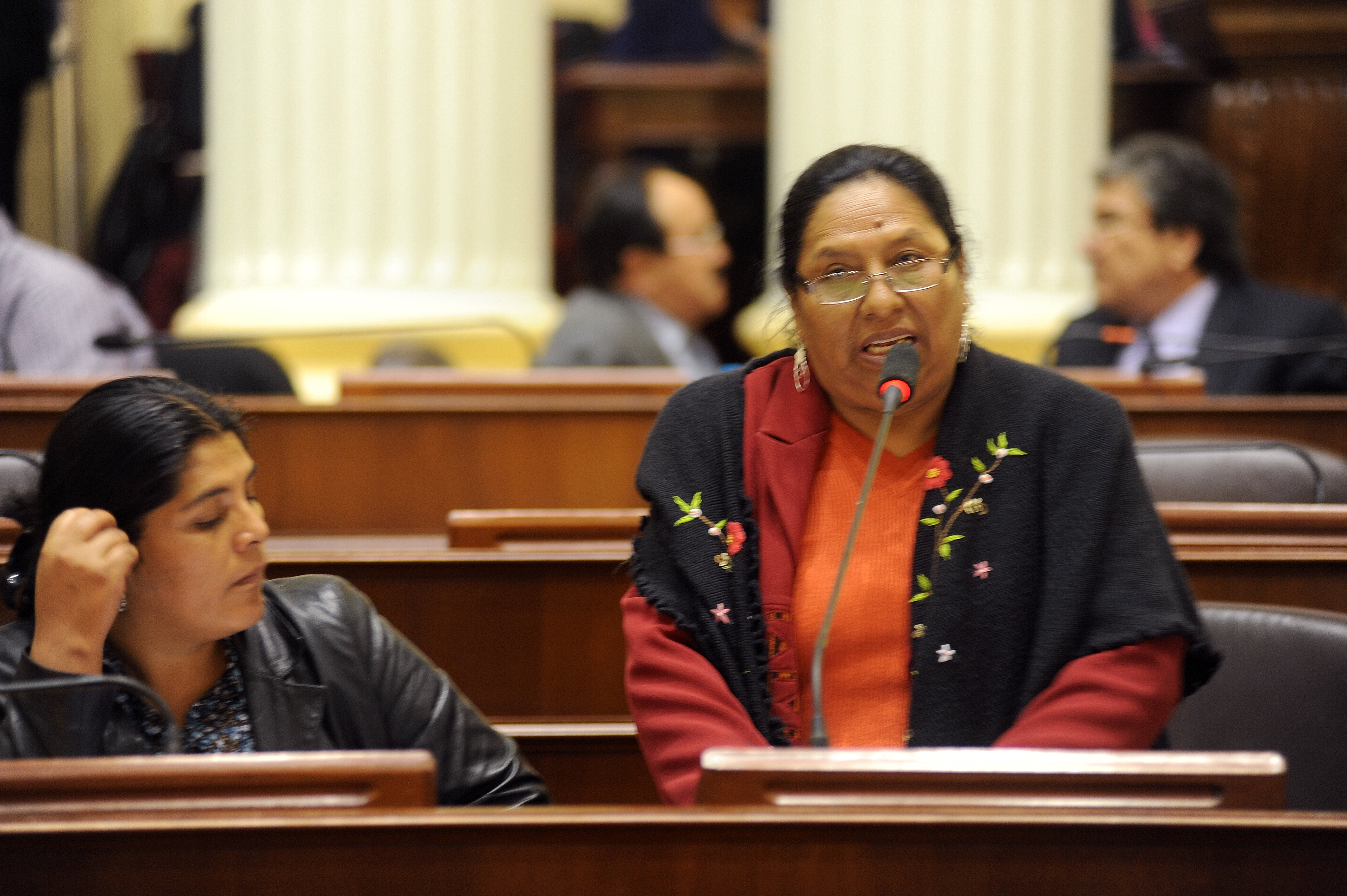 La legisladora María Sumire fija su posición en el debate parlamentario realizado esta tarde por el Pleno. A la izquierda: Juana Huancahuari.